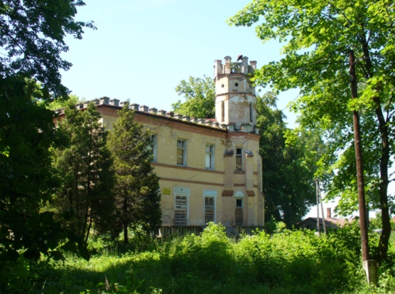 Cianowice, dworek